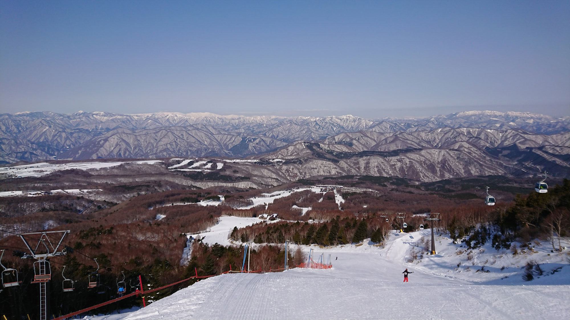 ハンターマウンテン塩原 ウォール・ストリートコース上からの眺め 2018年2月撮影